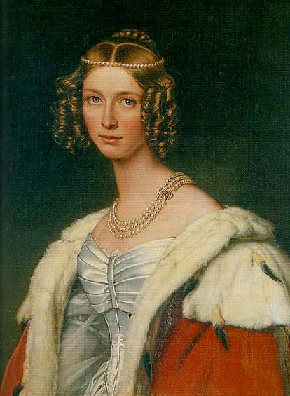 Prinzessin Théodolinde de Beauharnais (1814-1857)